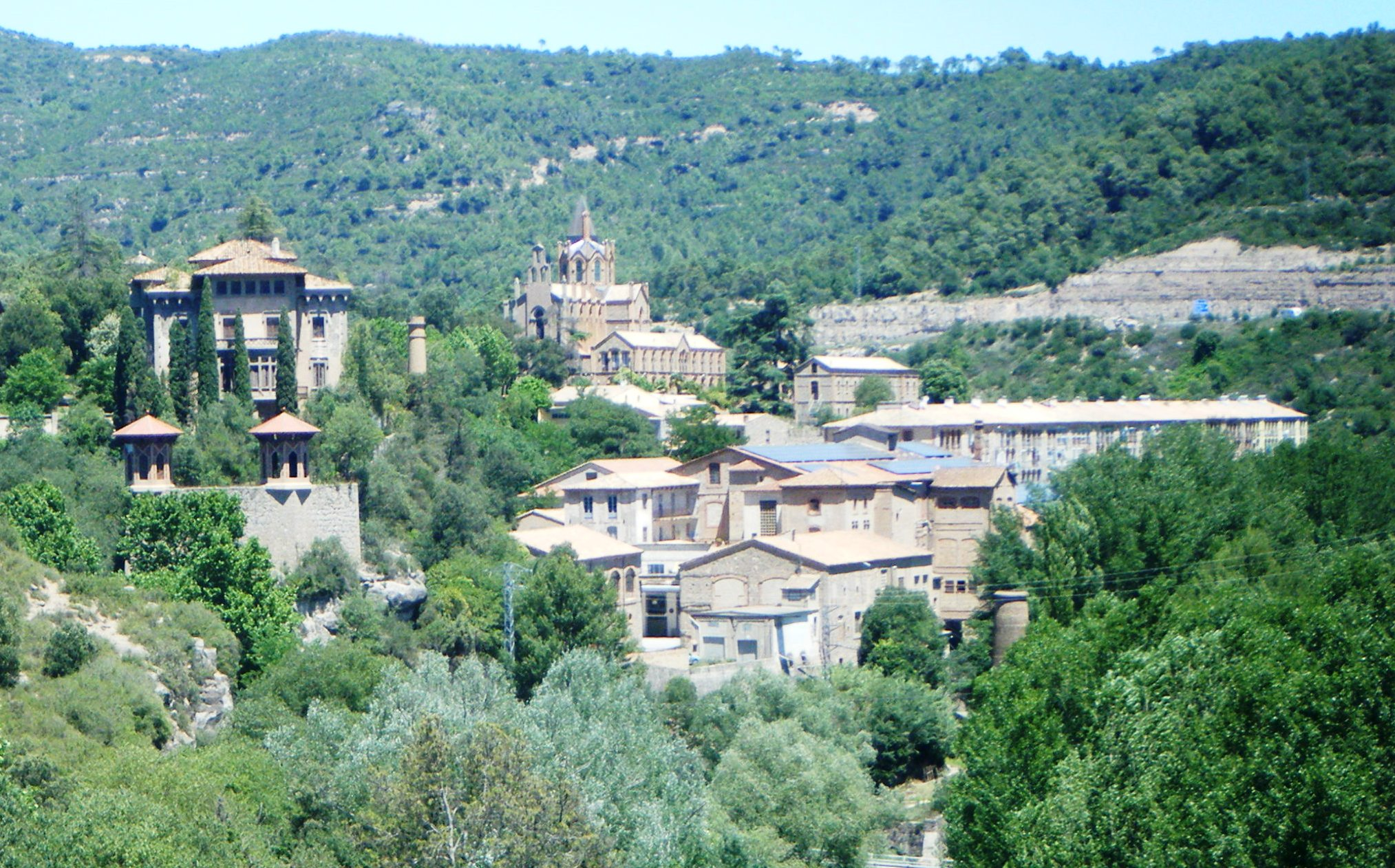 Imatge de la Colònia Pons (o Cal Pons), amb la fàbrica a primer terme, els pisos dels treballadors, l'església i el convent i la Torre Nova Nova de l'amo.